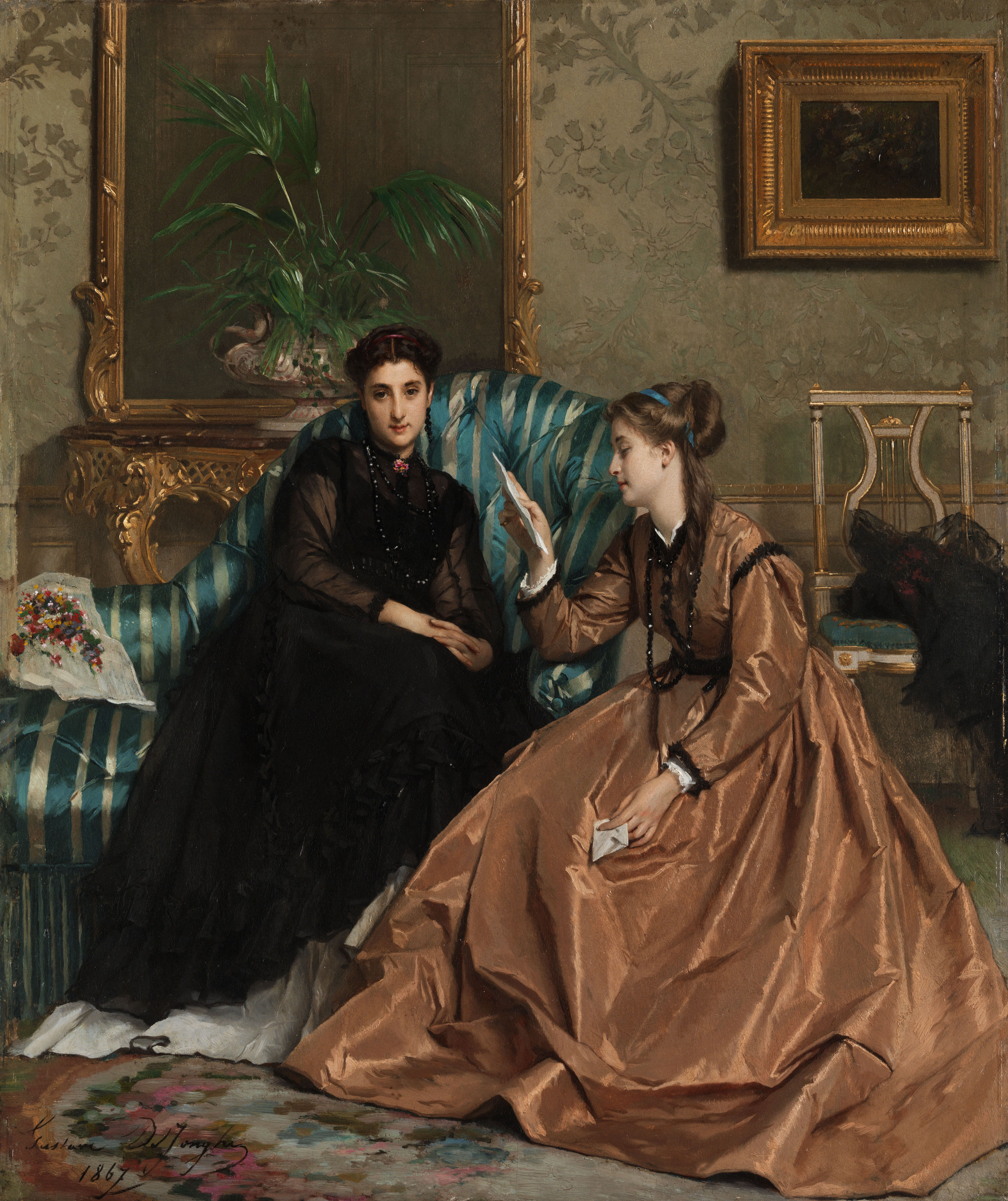 Der Liebesbrief. Öl auf Holz. 80,5 x 71 cm. Links unten signiert und datiert „1867“.